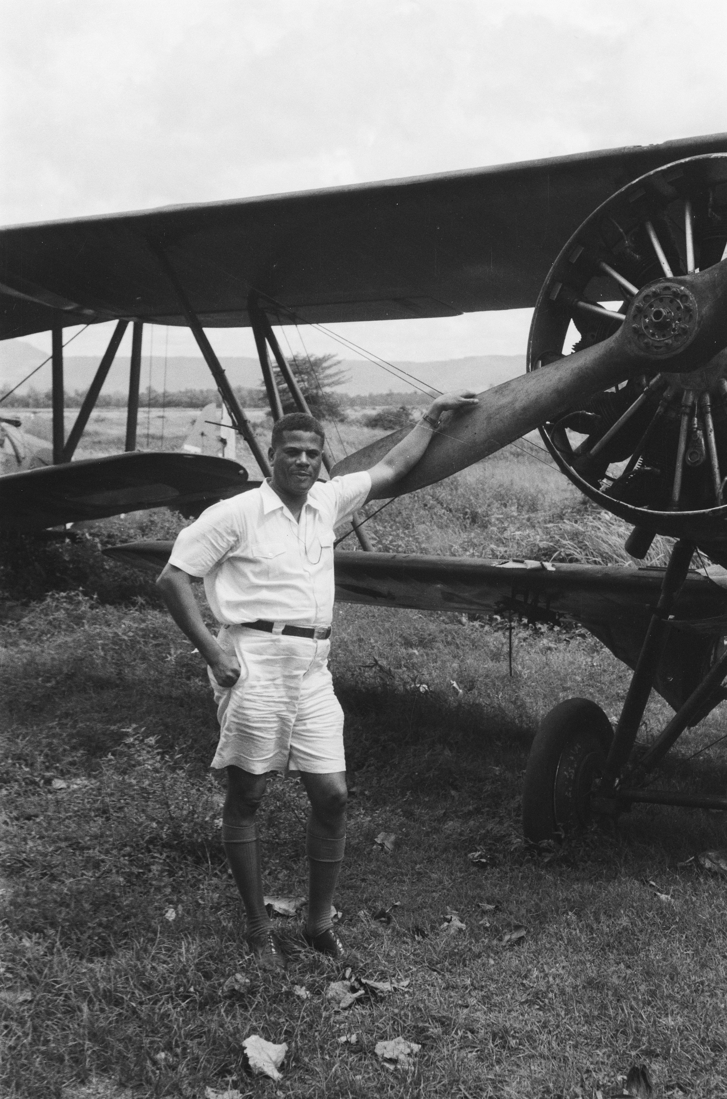 Collectie / Archief : Fotocollectie Dienst voor Legercontacten Indonesië Reportage / Serie : [DLC] Bezoek kolonel Julian aan Indonesië Beschrijving : Kolonel Julian poseert bij een achtergelaten en zwaar beschadid Japans vliegtuig Annotatie : De zwarte Amerikaans kolonel b.d. Hubert F. Julian, een voormalige piloot met de bijnaam "Black Eagle" bezocht als journalist Indonesië. Hij was fel anti-communistisch en steunde de Nederlandse houding in het conflict. Datum : januari 1949 Locatie : Indonesië, Nederlands-Indië, Yogyakarta Fotograaf : Kalken, van / DLC Auteursrechthebbende : Nationaal Archief Materiaalsoort : Negatief (zwart/wit) Nummer archiefinventaris : bekijk toegang 2.24.04.03 Bestanddeelnummer : 508-6-5